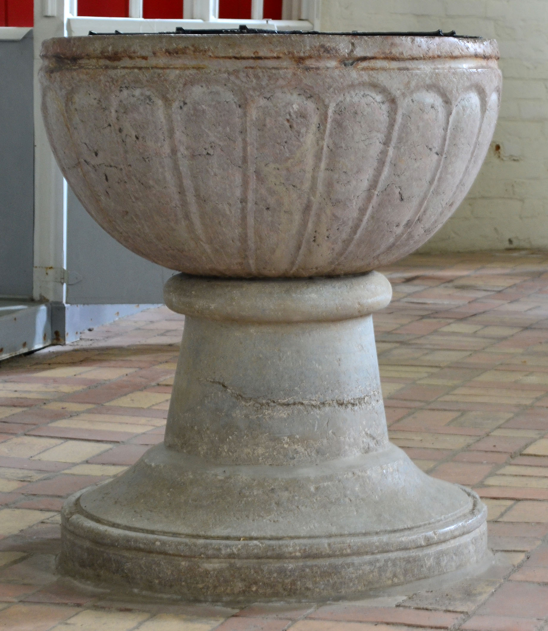 Damshagen, St. Thomas- Kirche, Taufstein